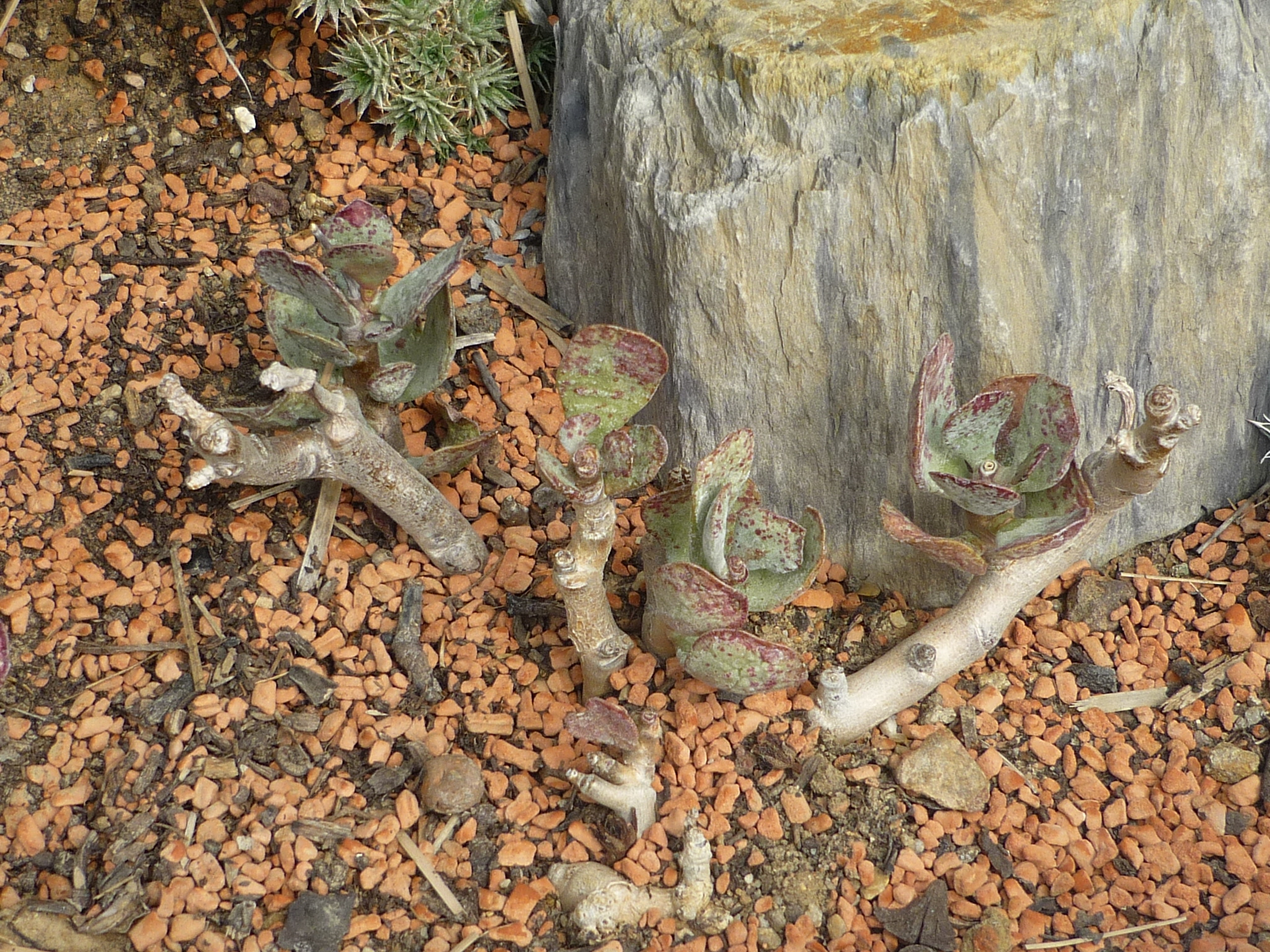 Adromischus hemisphaericus, jardin des plantes de Paris, France